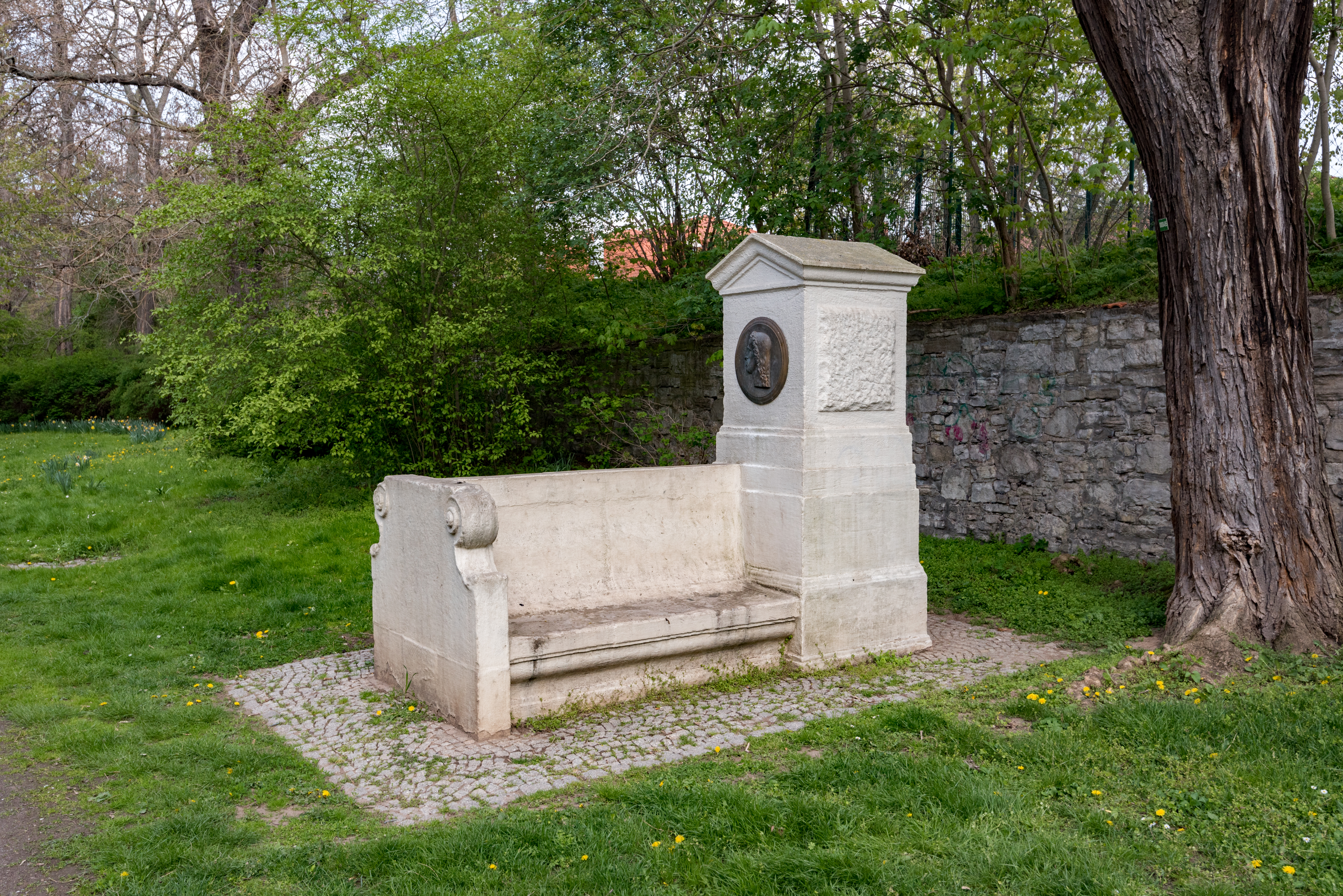 Aschersleben, Augustapromenade, Schillerbank